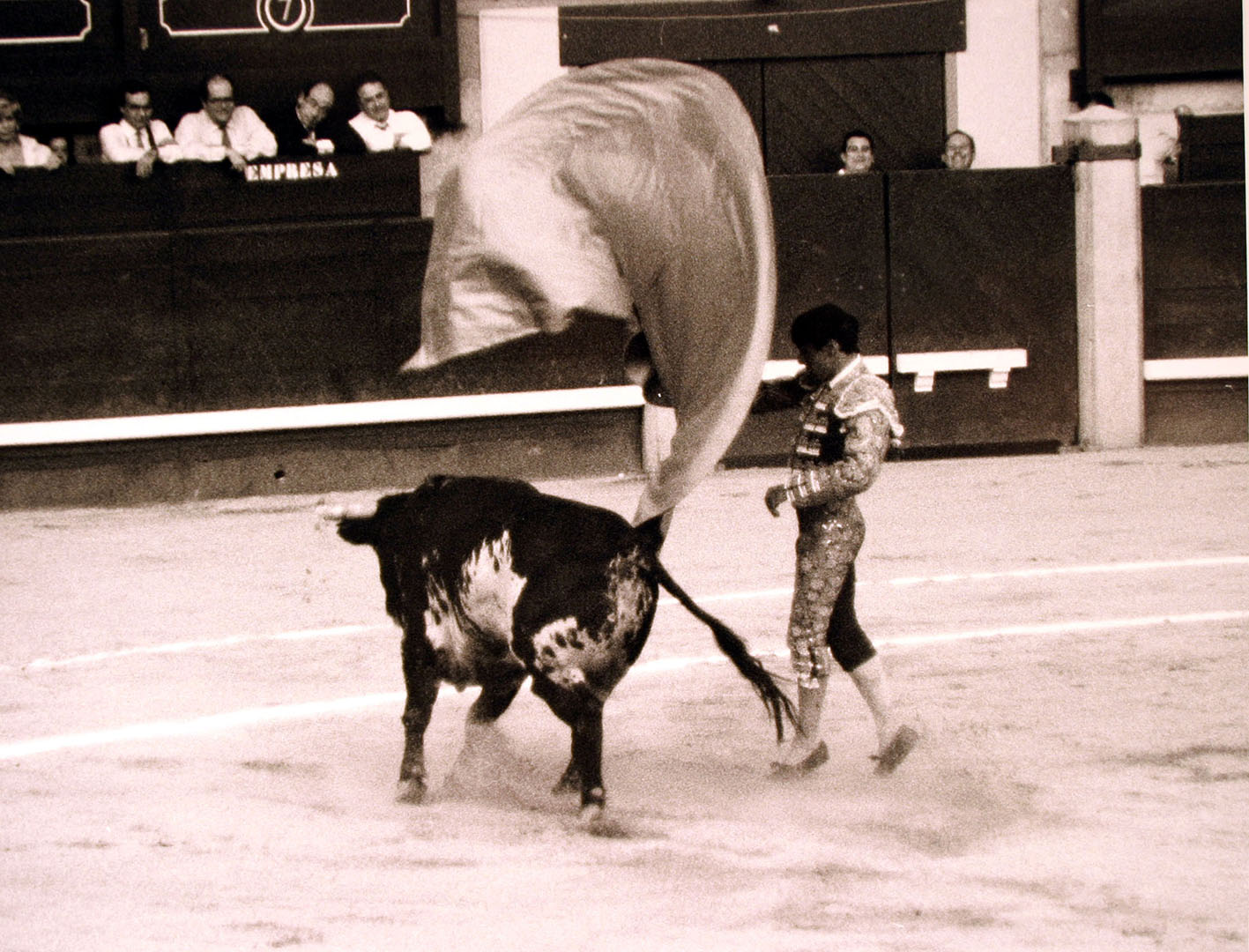 Serpentina, de José Miguel Arroyo, Joselito, en La Cubierta de Leganés, el 30 de julio de 1998.